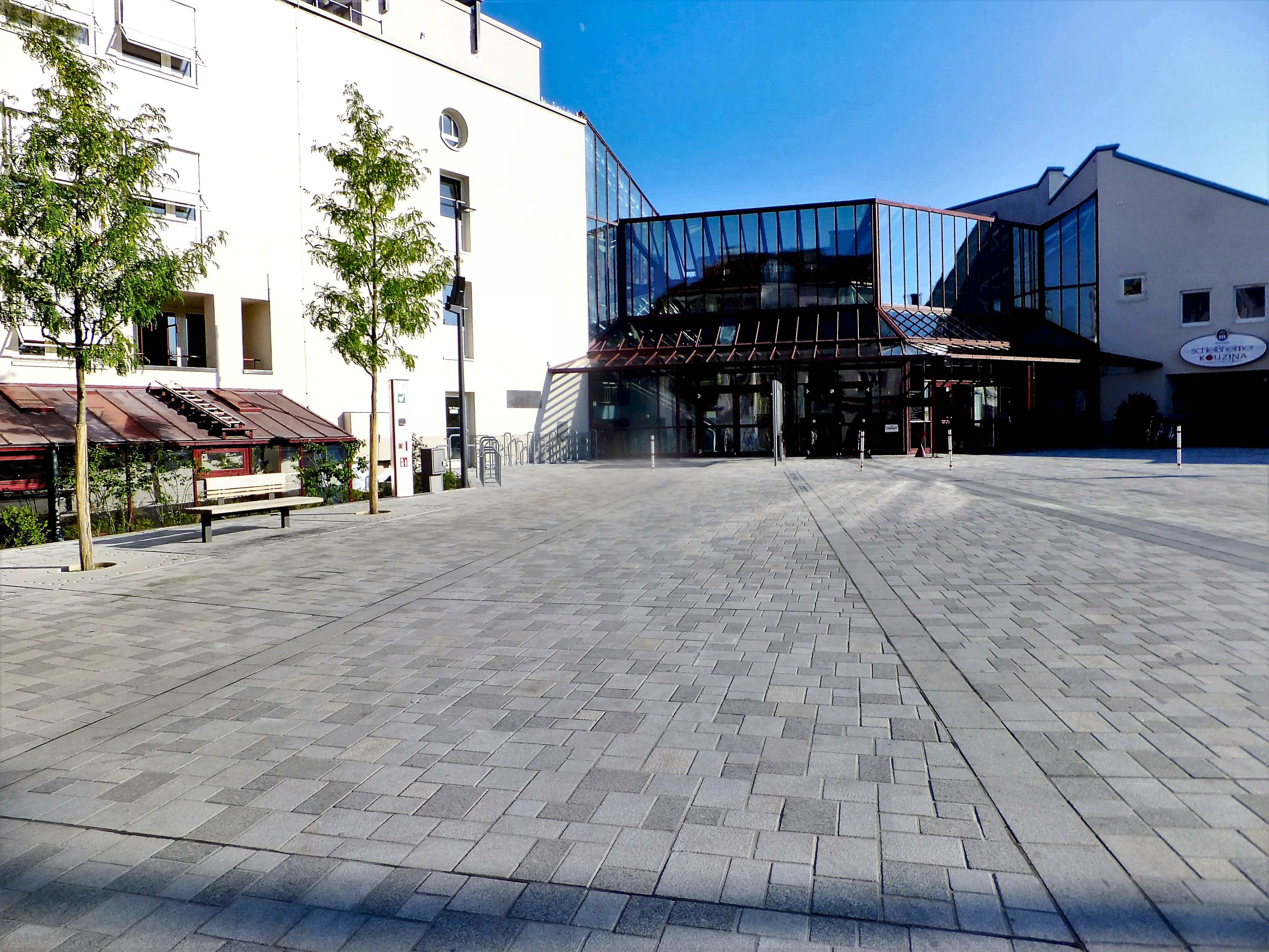 Rathaus Unterschleißheim mit Vorplatz nach Sanierung, 22.8.2015